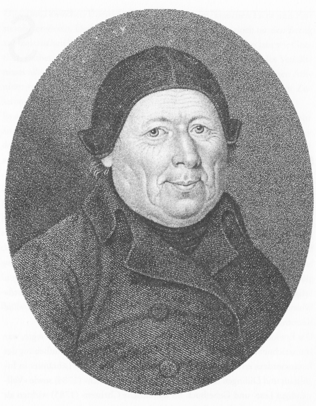 Punktierstich von Johann Heinrich Lips nach Jakob Sommerhalder.